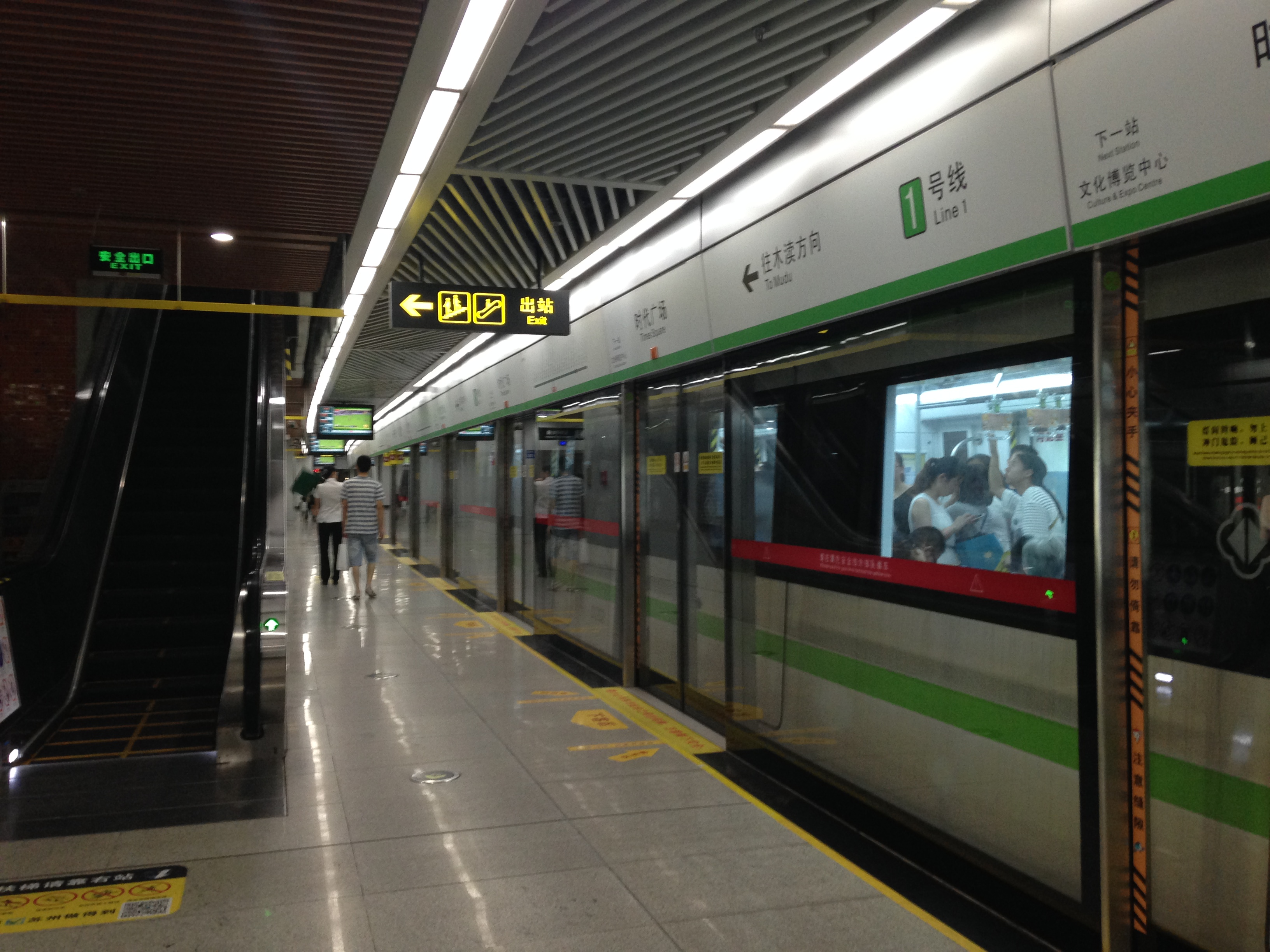 時代広場駅のホーム